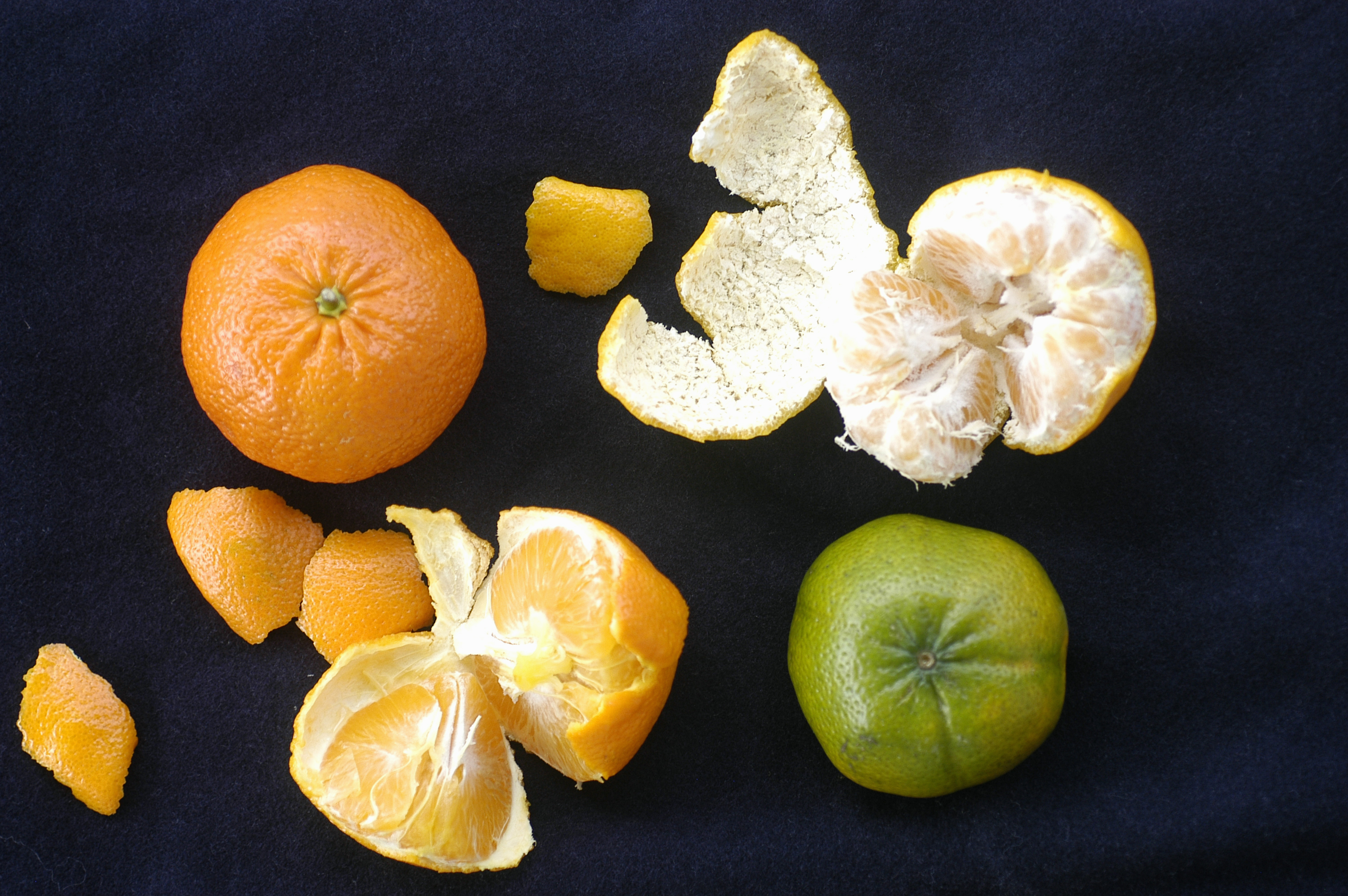 Tangerina (Citrus Reticulata) frutos